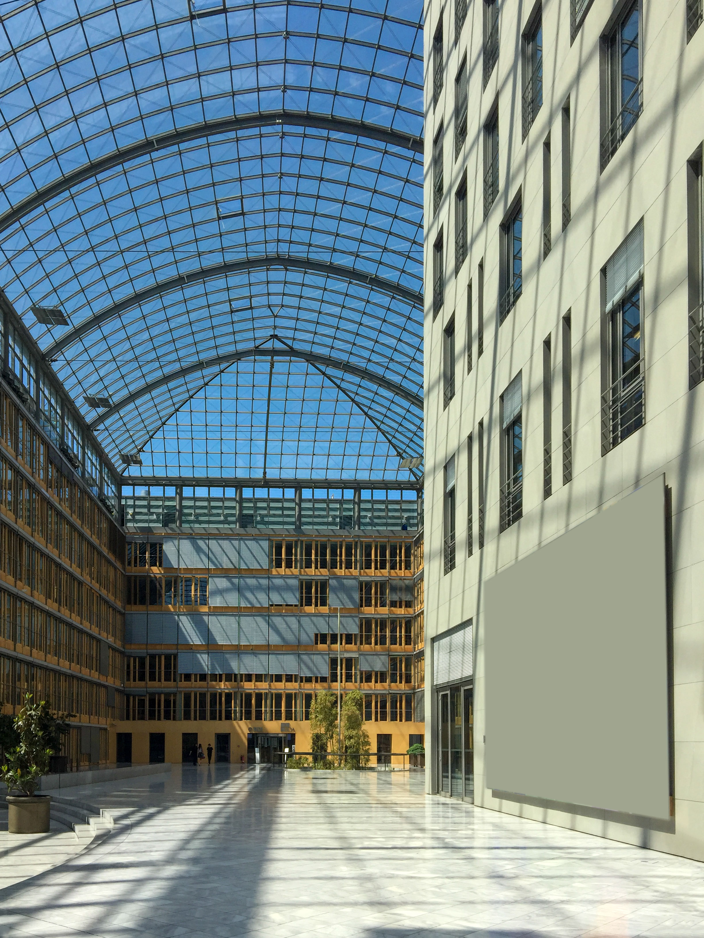 Das Haus der Deutschen Wirtschaft in Berlin-Mitte. Ansässig sind hier der BDI, der BDA sowie die DIHK.